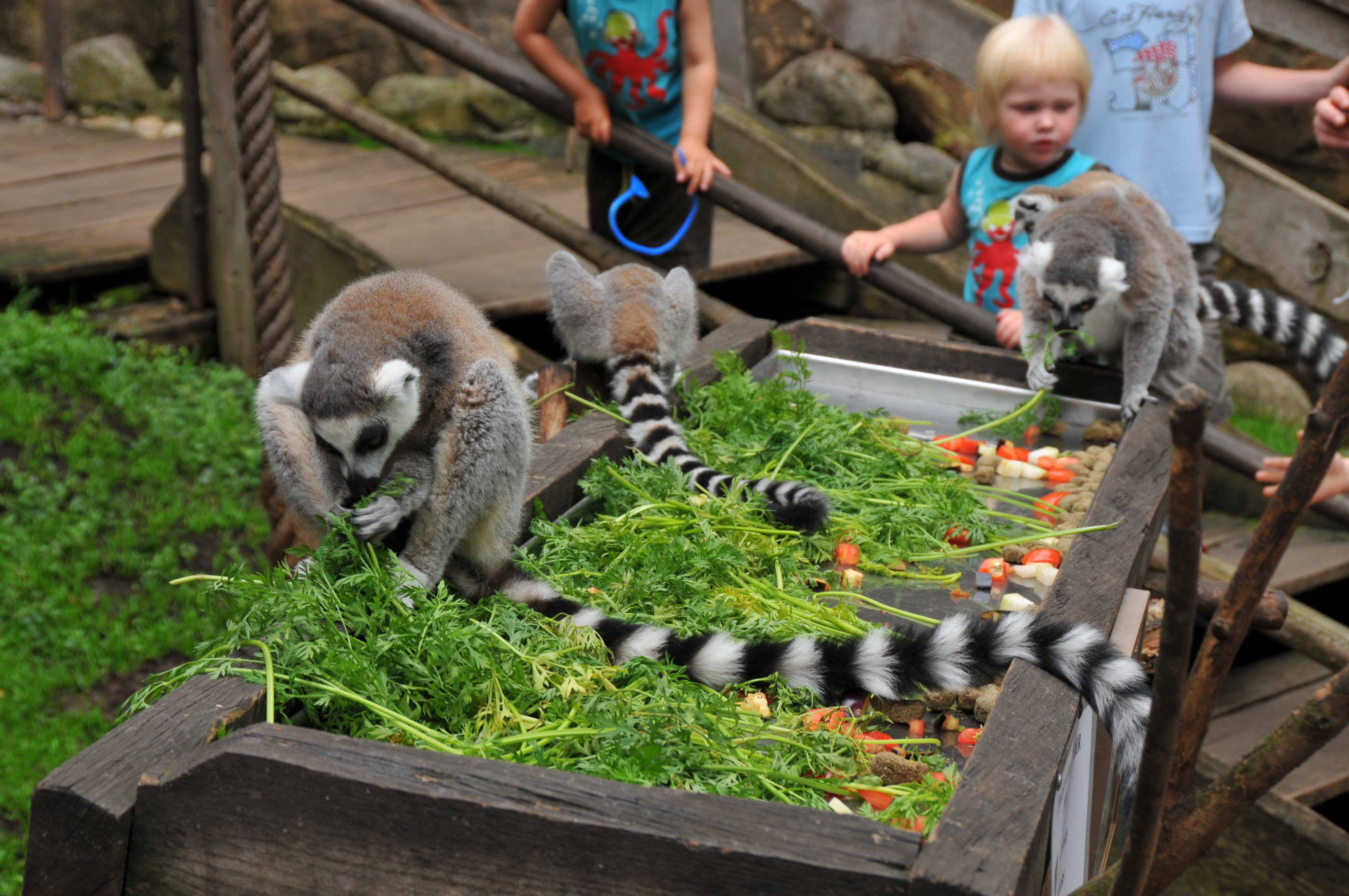 Lemurer och besökare i Skansenakvariet